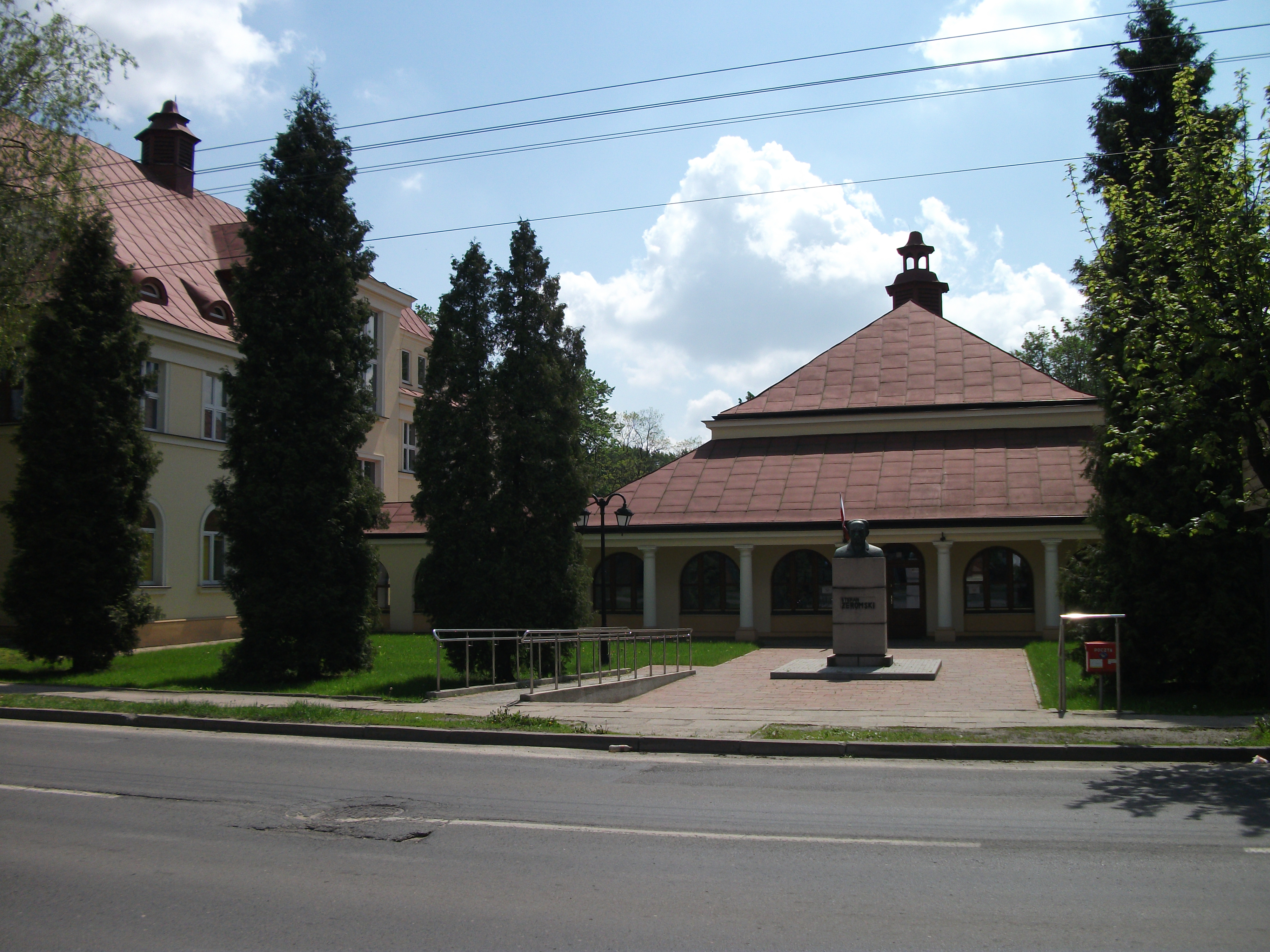 Kolegium Nauczycielskie w Zgierzu